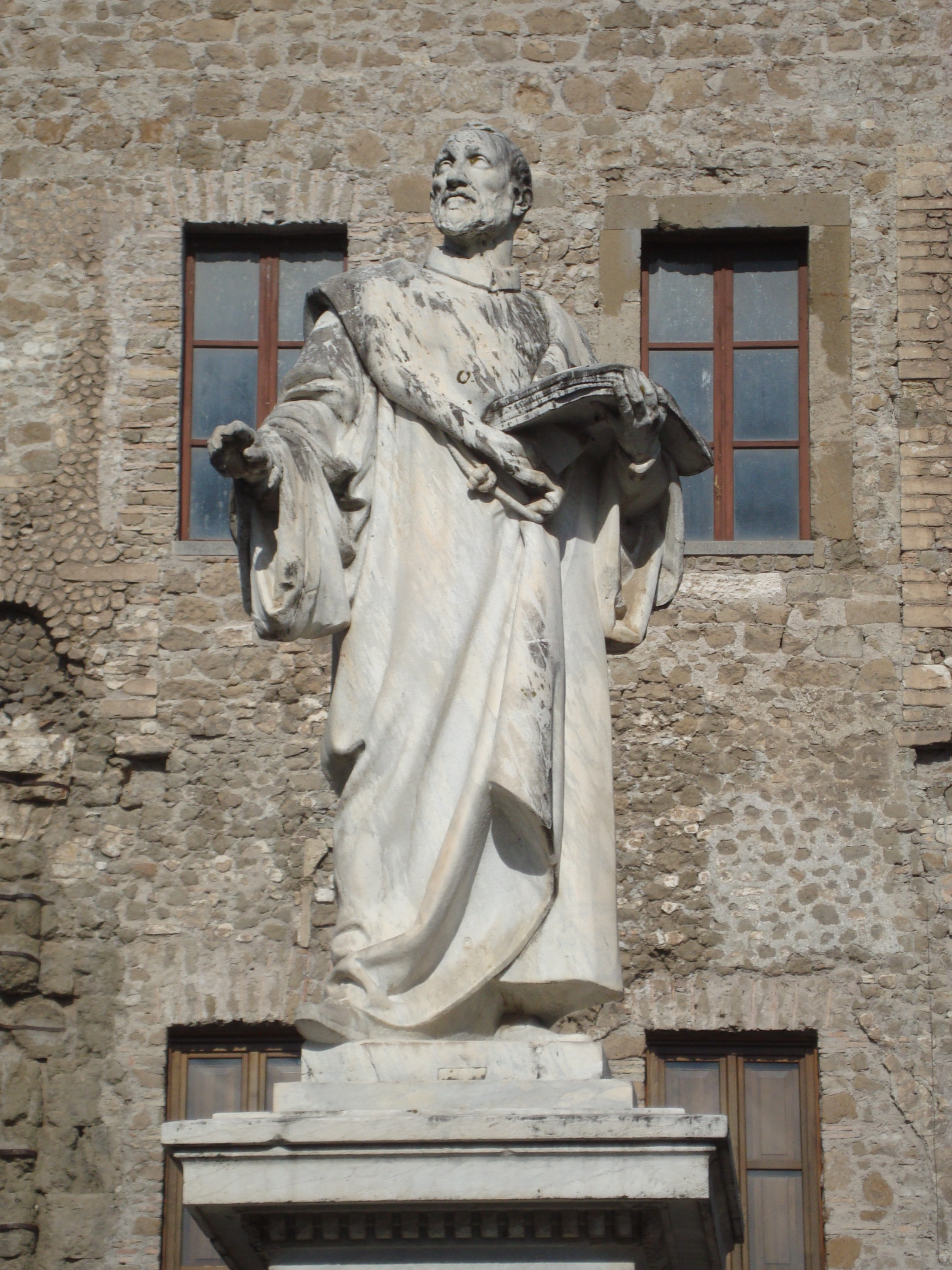 Statue de Giovanni Pierluigi da Palestrina sur la place de la ville de Palestrina, Lazio, Italie